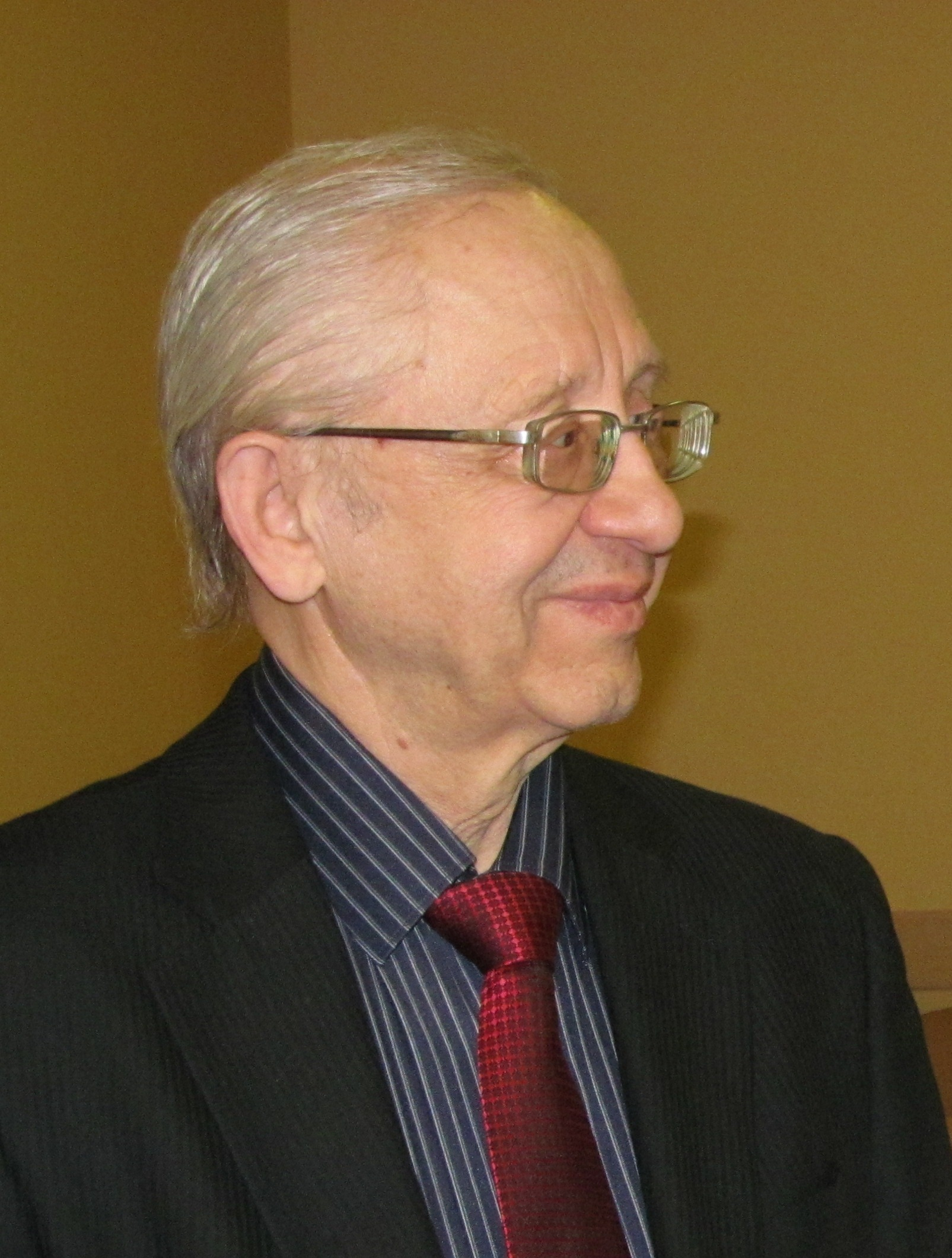 Музыковед Анатолий Павлович Милка